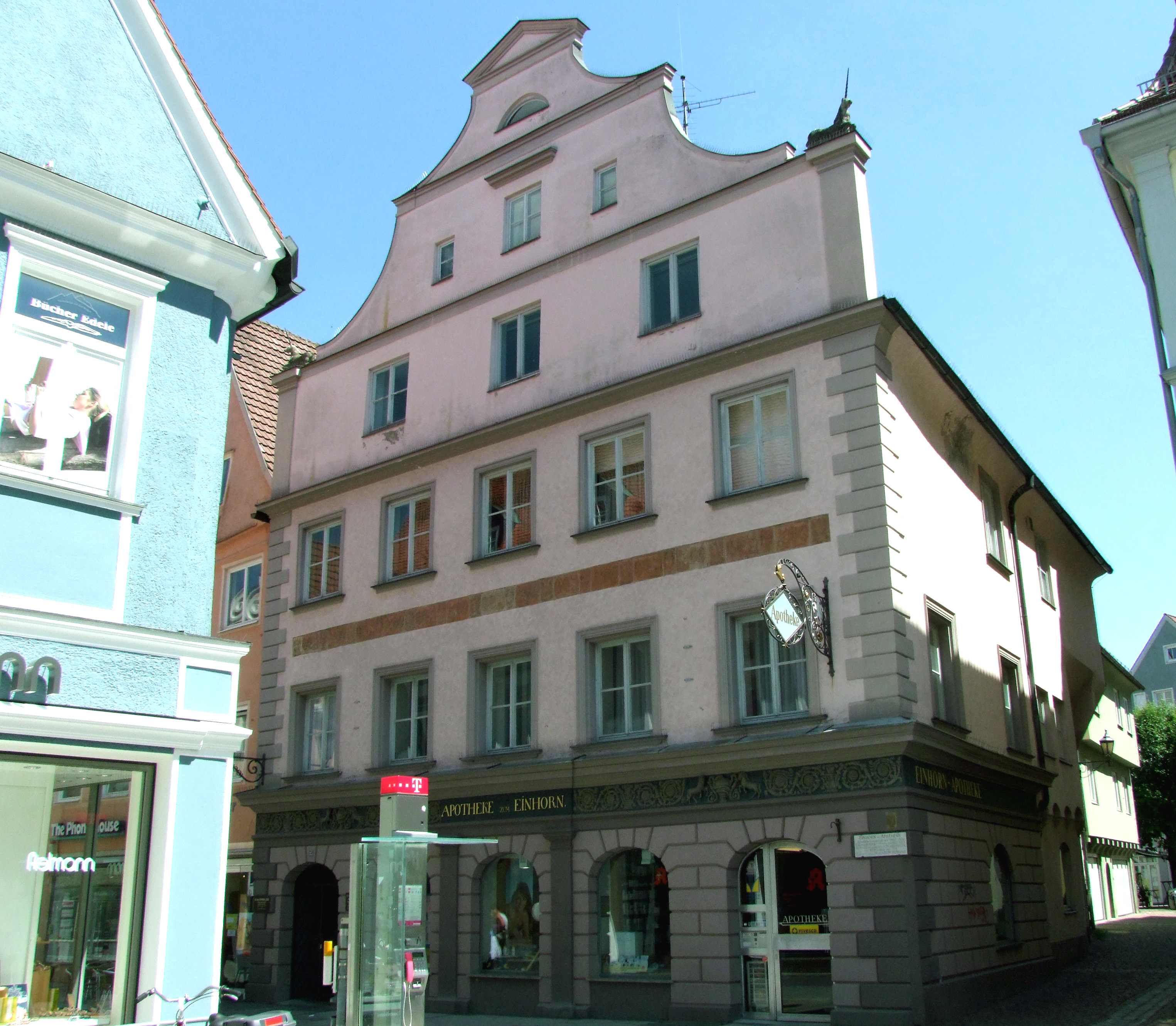 Die Einhornapotheke im oberschwäbischen Memmingen. Frontansicht aus der Kreuzstraße fotografiert